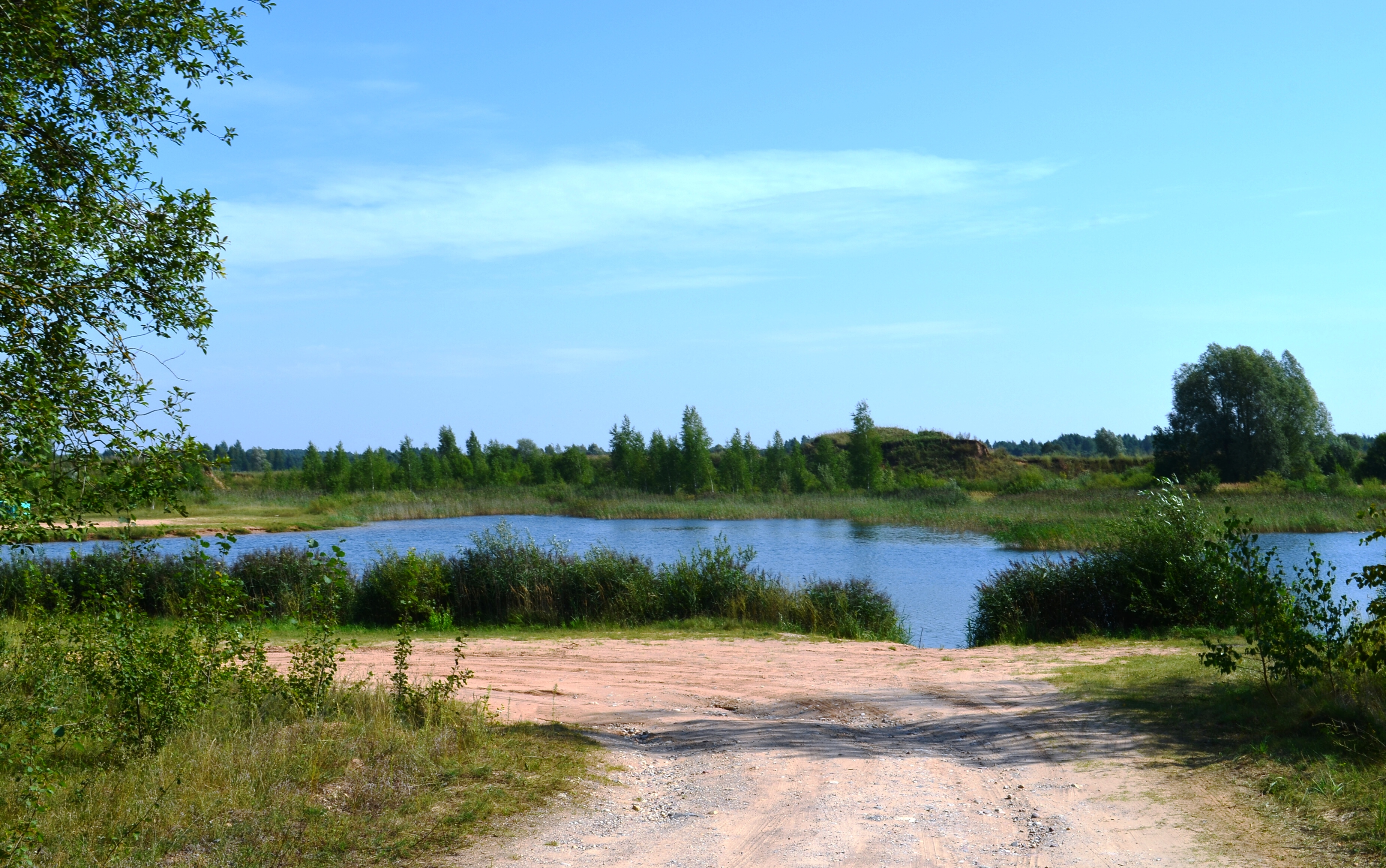 Karjeras, Dvariškiai I, Kėdainių r.